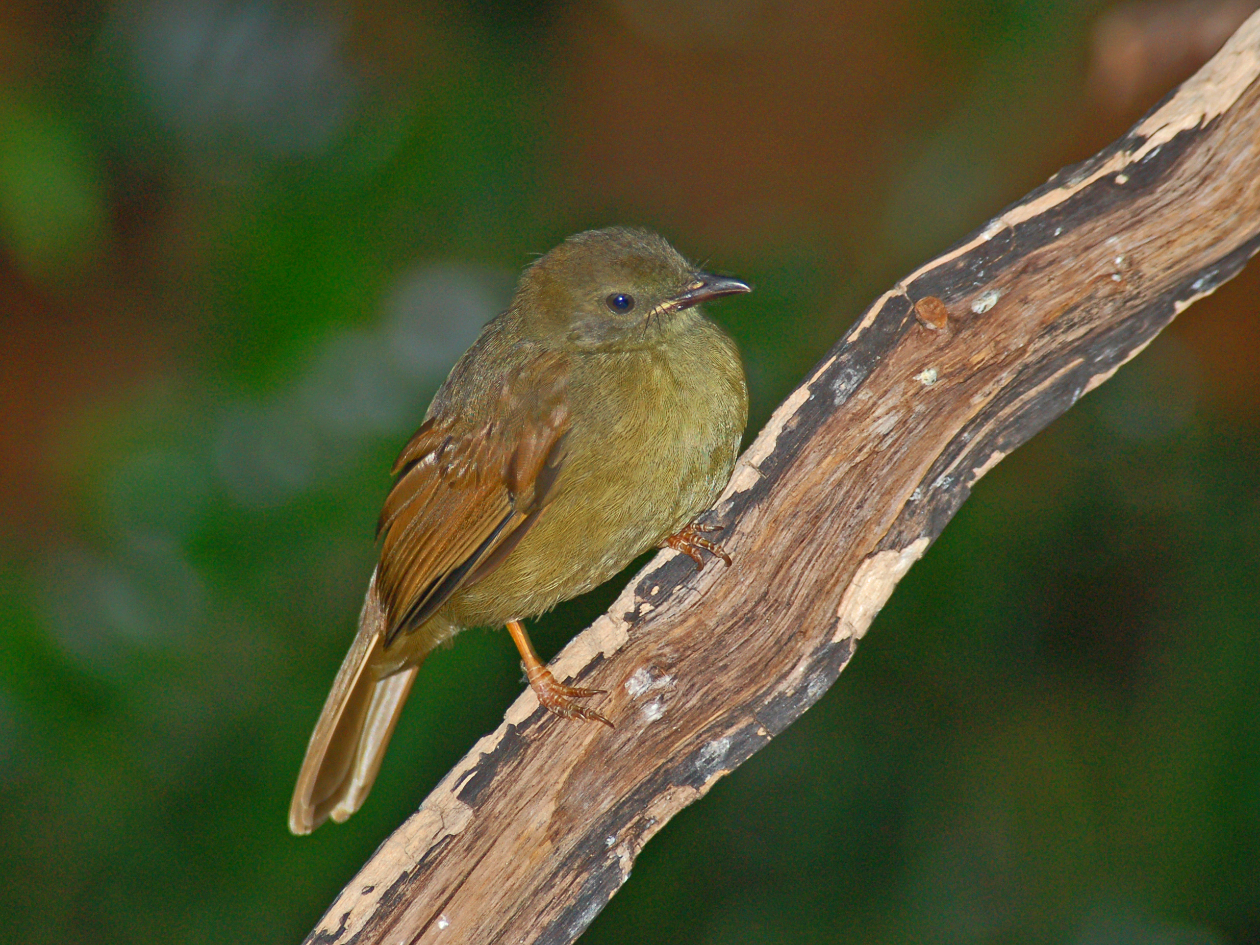 Andropadus virens at Bird Kingdom, Niagara Falls